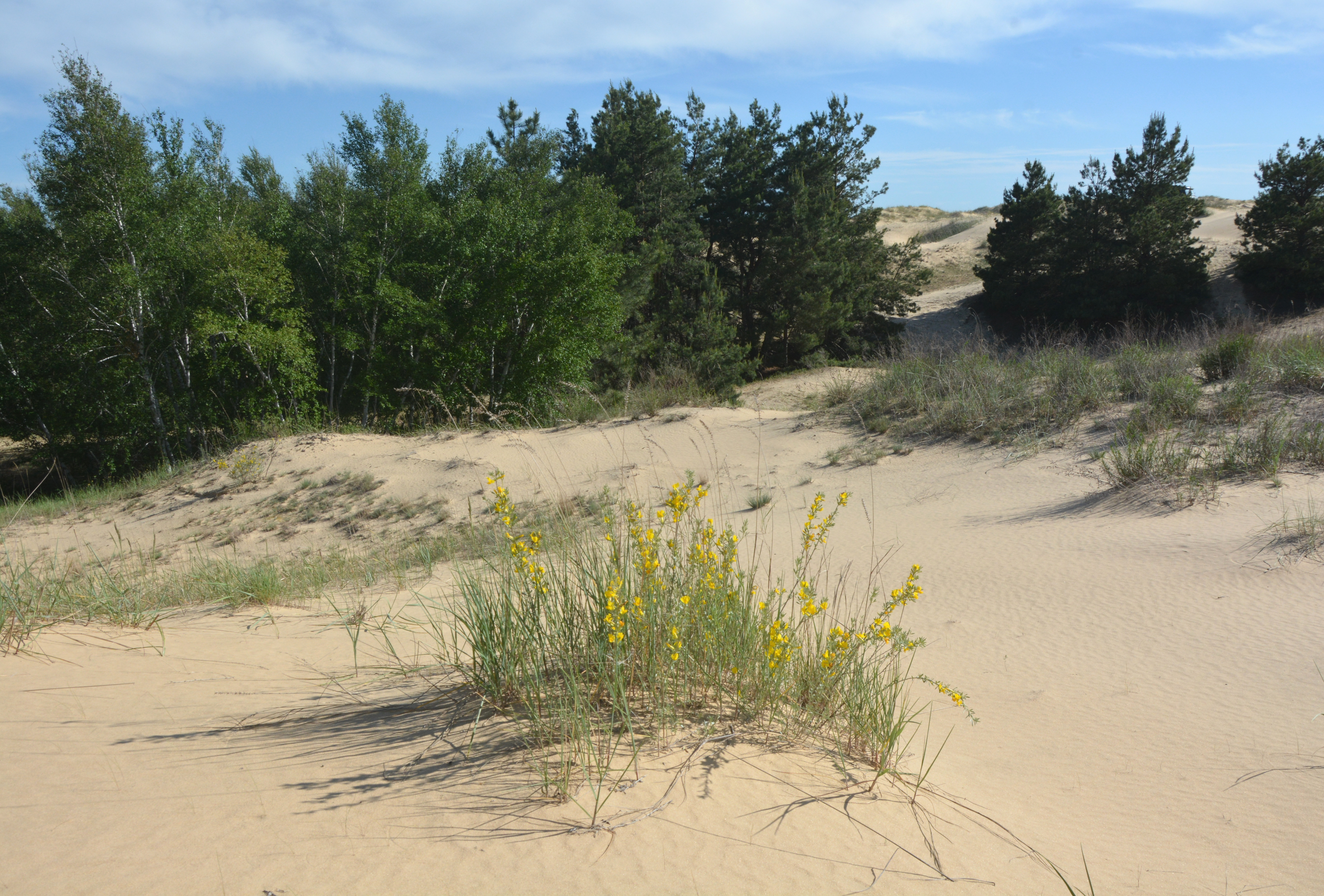 Олешківські піски, Цюрупинський район, вул. Заводська, 1в, с. Раденськ